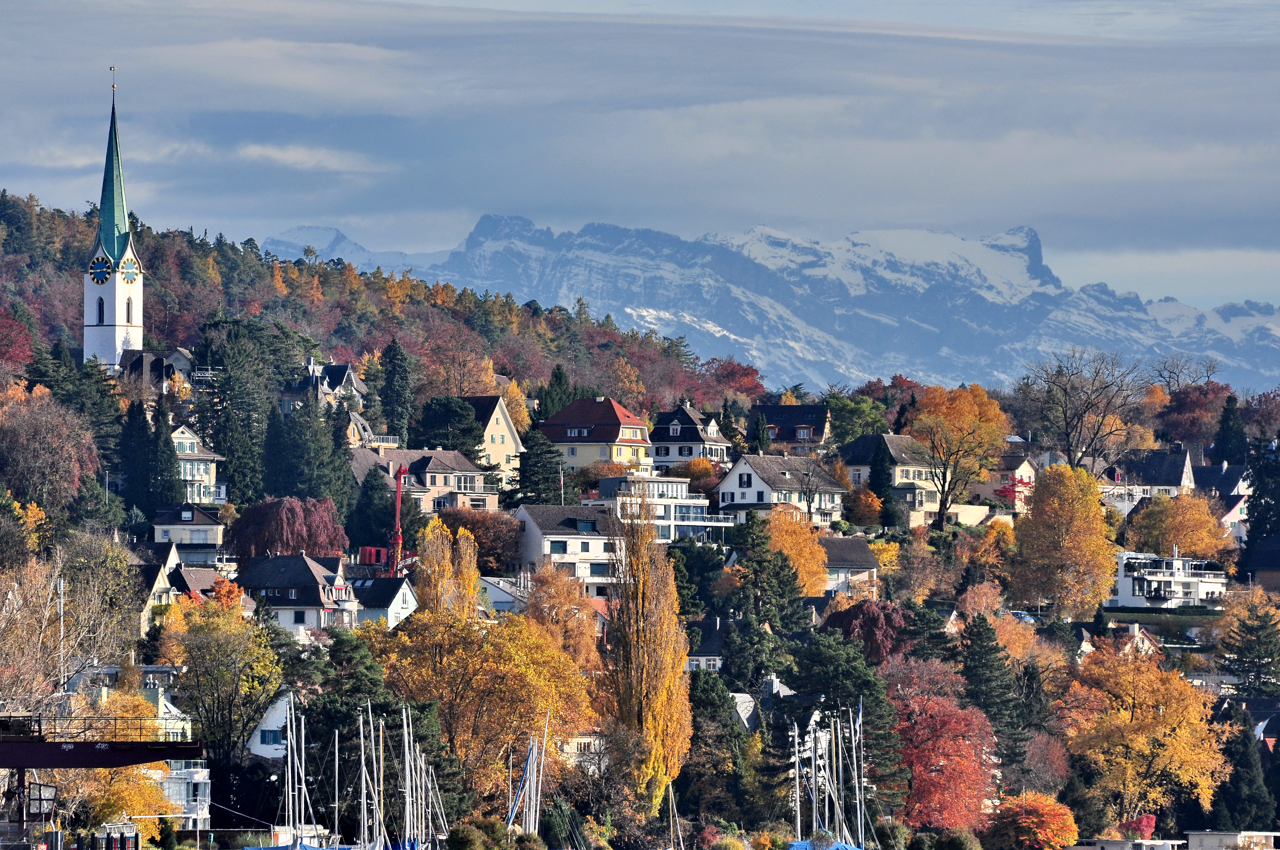 Zollikon on Zürichsee lakeshore (Switzerland) as seen from Zürichhorn in Zürich-Seefeld, Zürichsee-Schiffahrtsgesellschaft (ZSG) landing gate to the left, Glarner Alpen in the background.